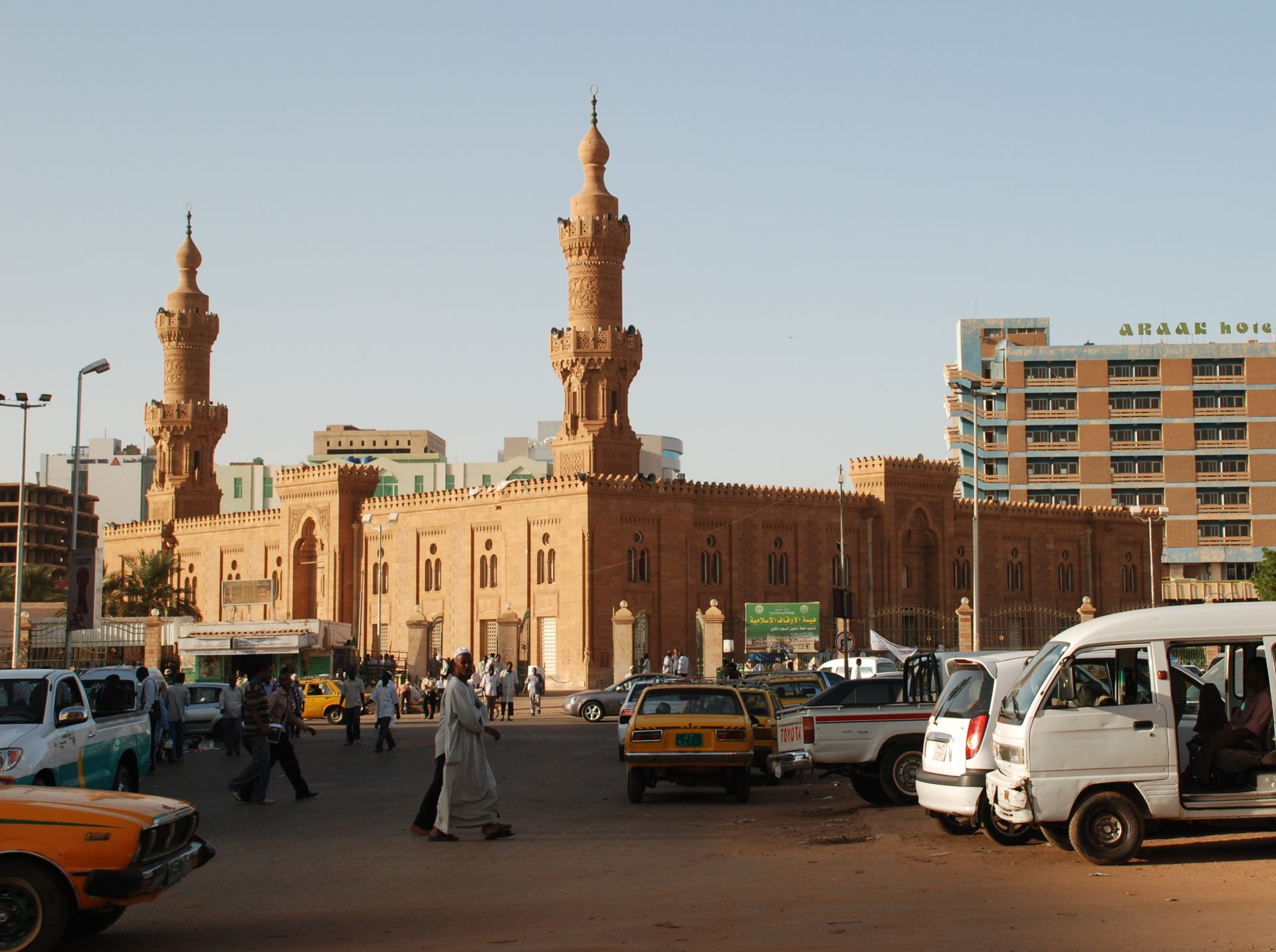 Great mosque in Khartum, Sudan